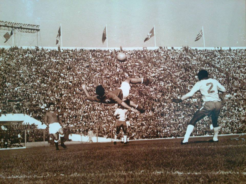 Histórica chilenita de Honorino Landa contra Brasil en el mundial del 62